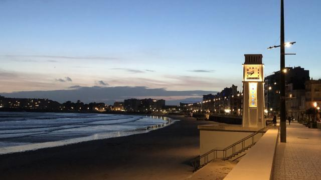 Photographie du "remblai" (promenades Lafargue et Clemenceau) des Sables-d'Olonne de nuit prise en 2019